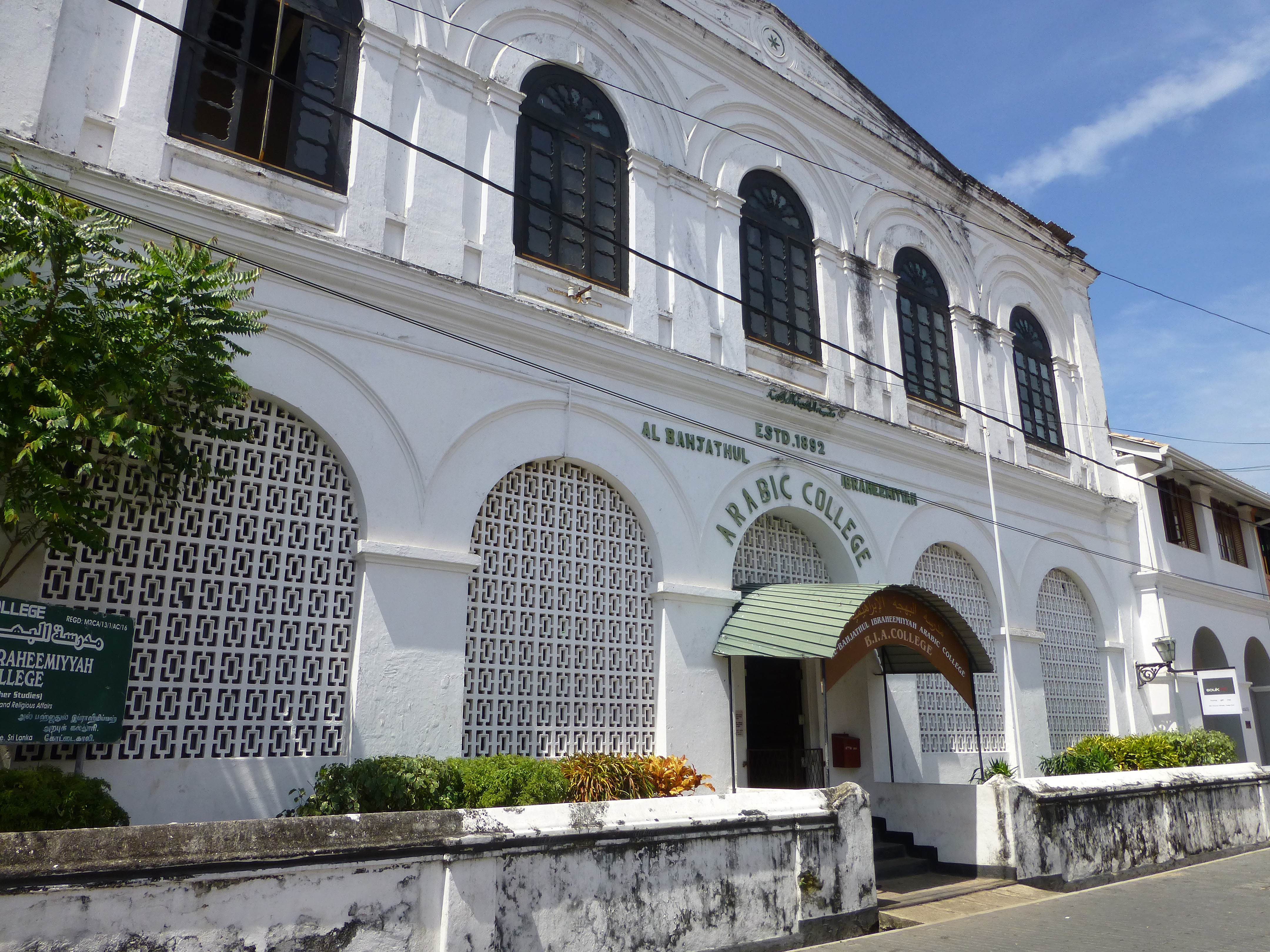 Galle (Sri Lanka) : Al Bahjathul Ibrahimiya Arabic College, fondé en 1892